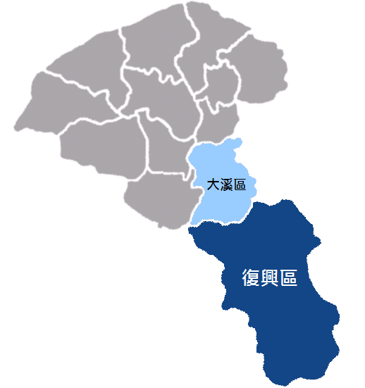 復興區位置圖